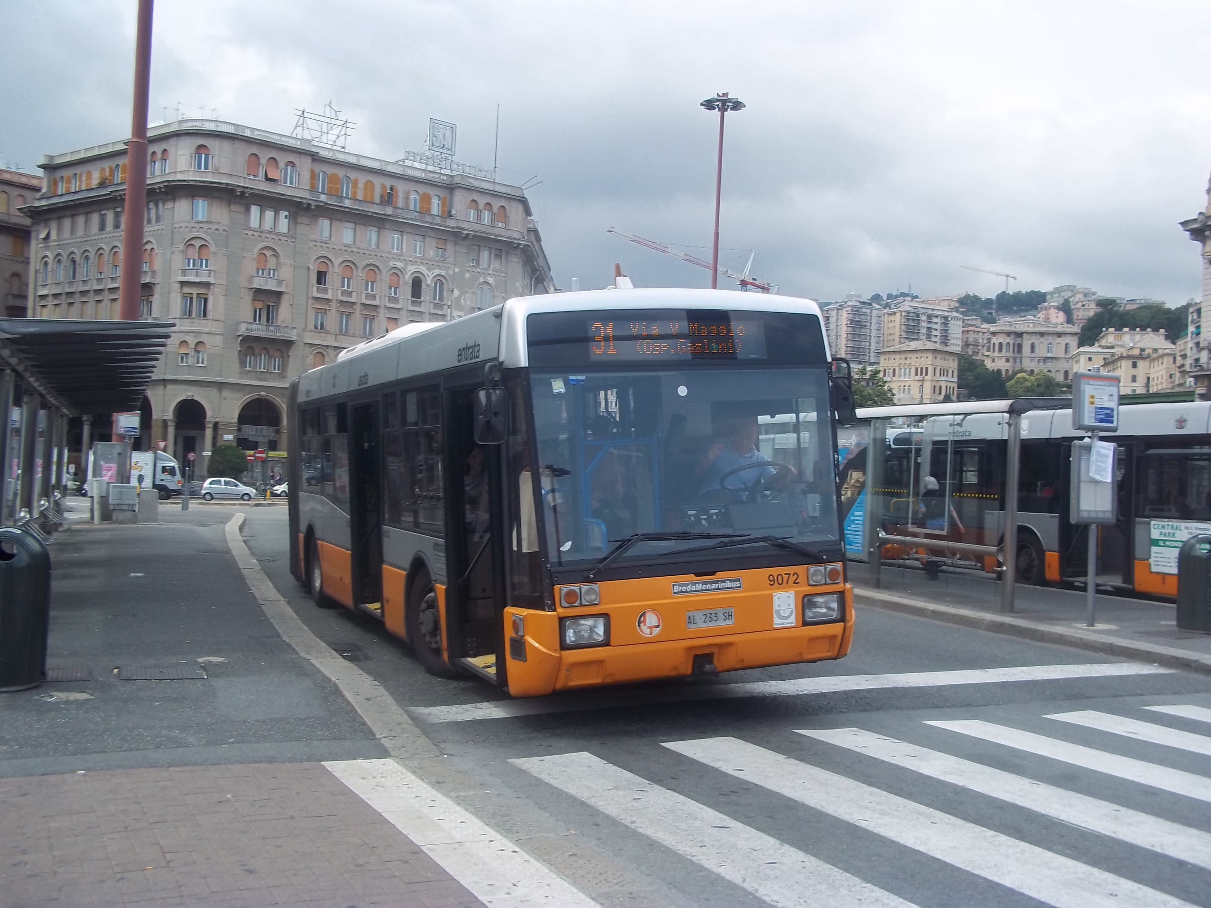 BMB 321 AMT Genova 9072